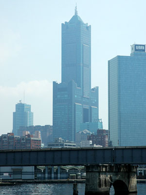 位於高雄市苓雅區的東帝士建台大樓，是南台灣最高的建築物，因為地面以上樓層達85層，因此常被簡稱為東帝士85。圖中為矗立在午前港都常見的煙塵中之東帝士建台大樓，照片拍攝於愛河河畔。本圖片由上傳者SElephant拍攝於2004年10月。